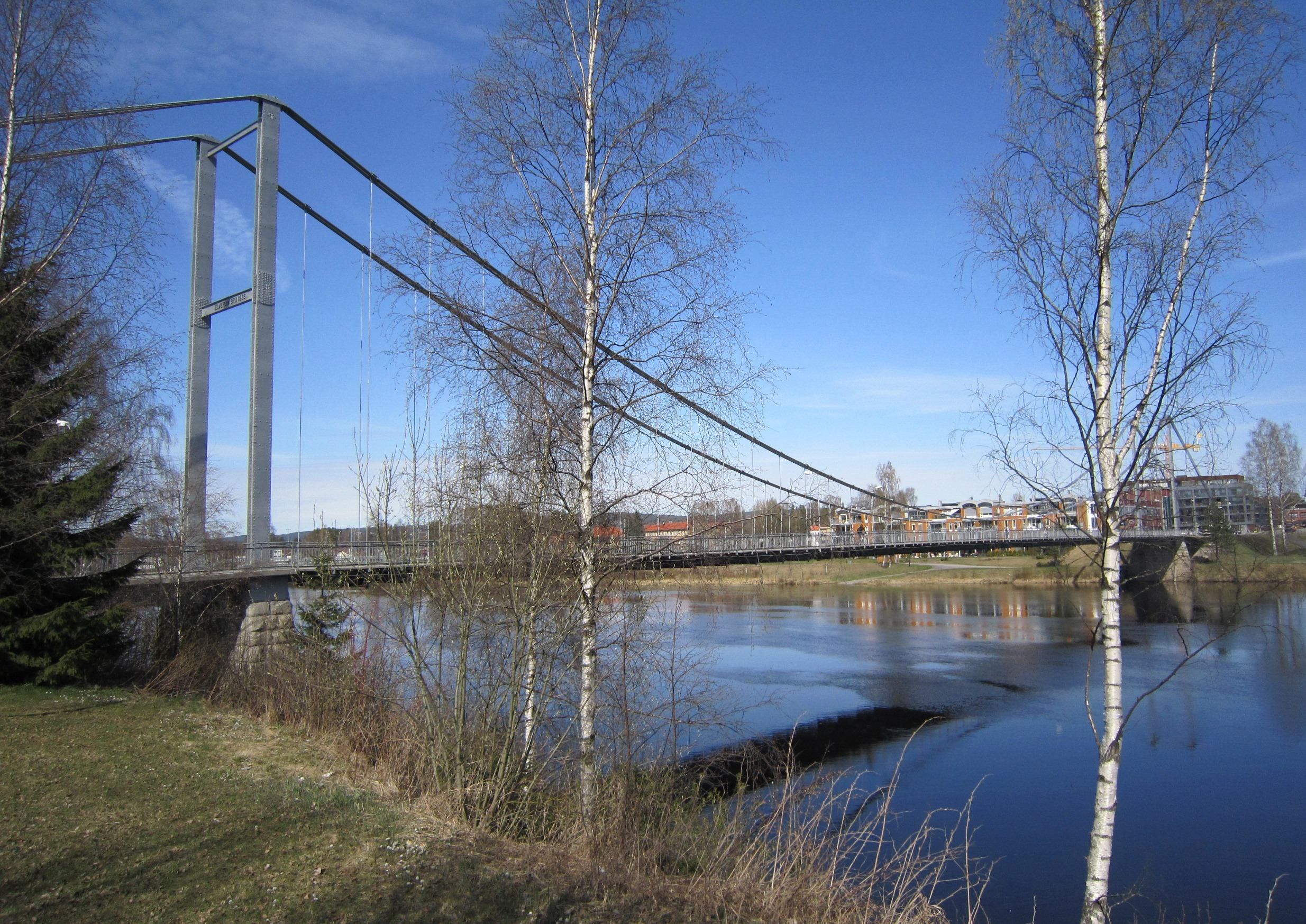 Nybrua i Elverum